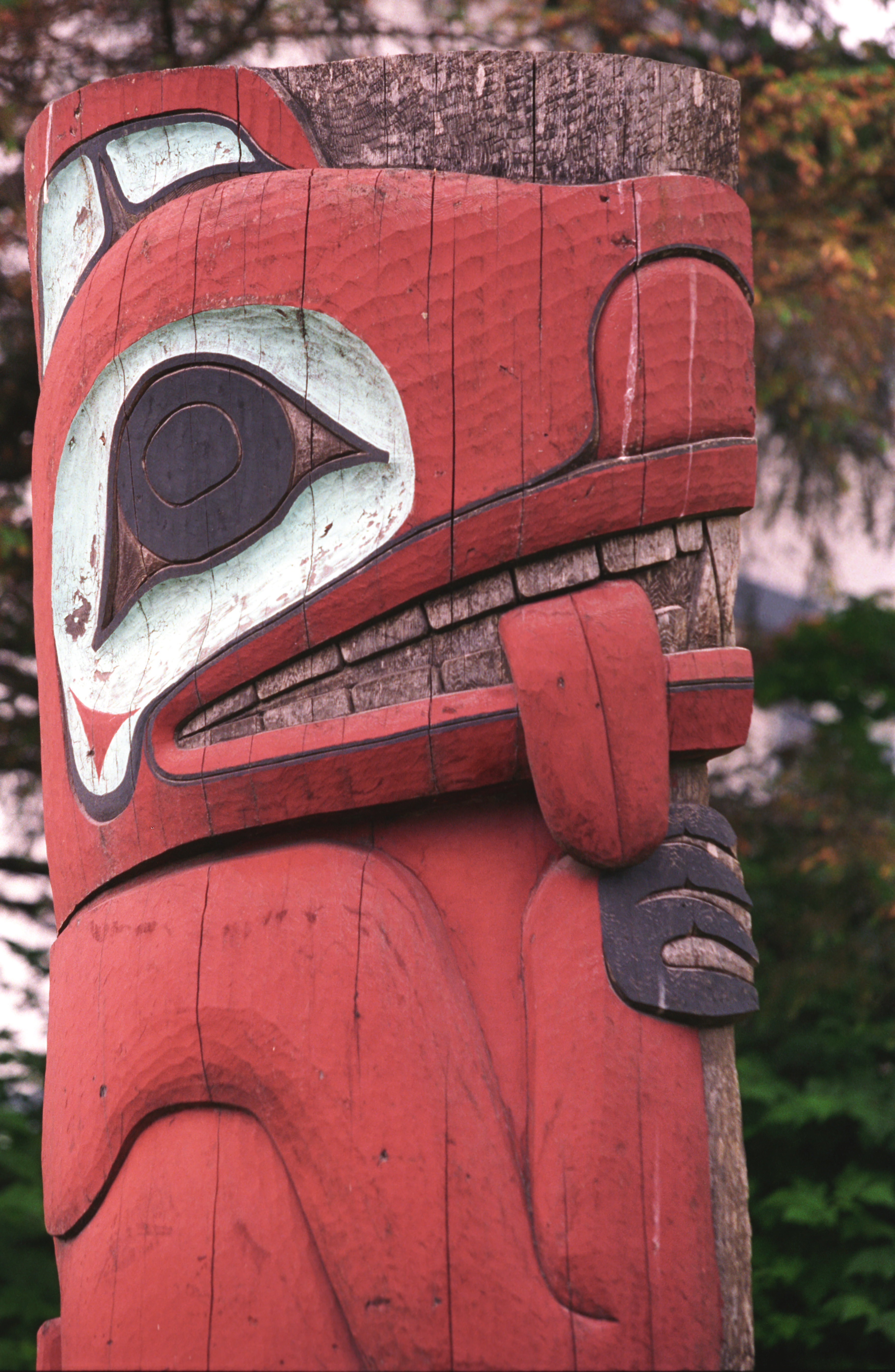 Totem pole, Saxman Totem Park